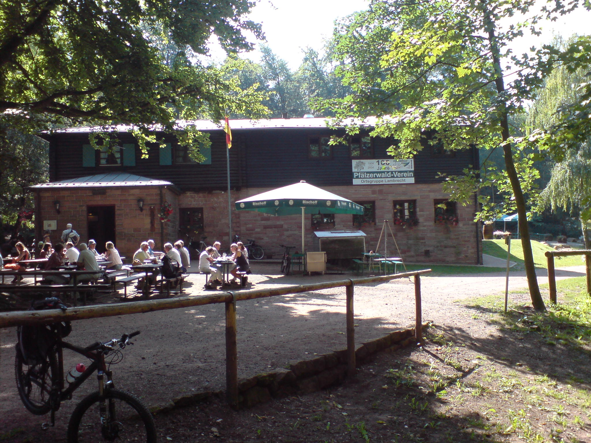 Das Waldhaus Lambertskreuz bei Neidenfels.